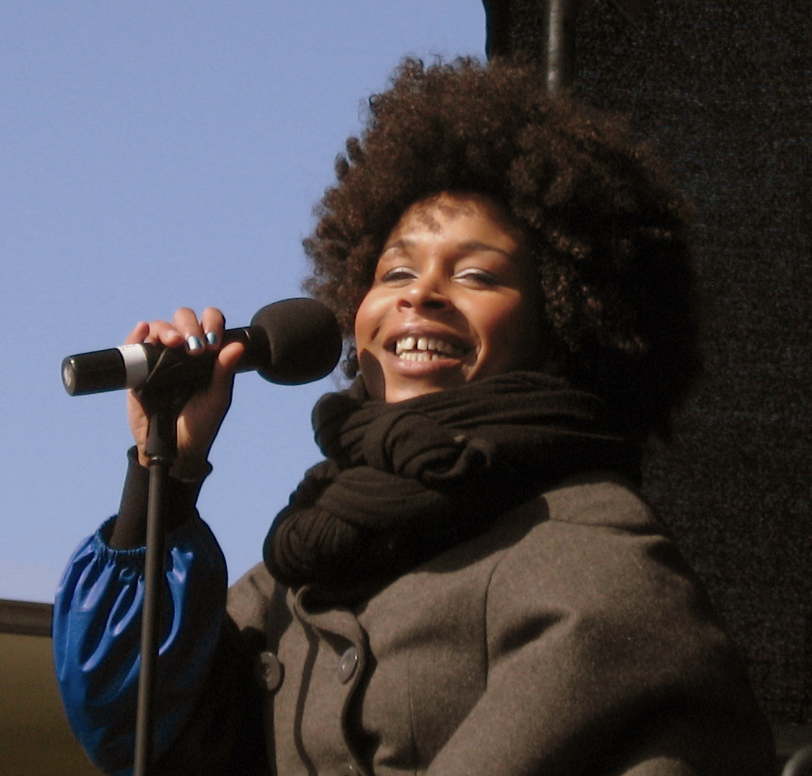 Nabiha @ Skovmand & Bues Fødselsdag i Hirtshals